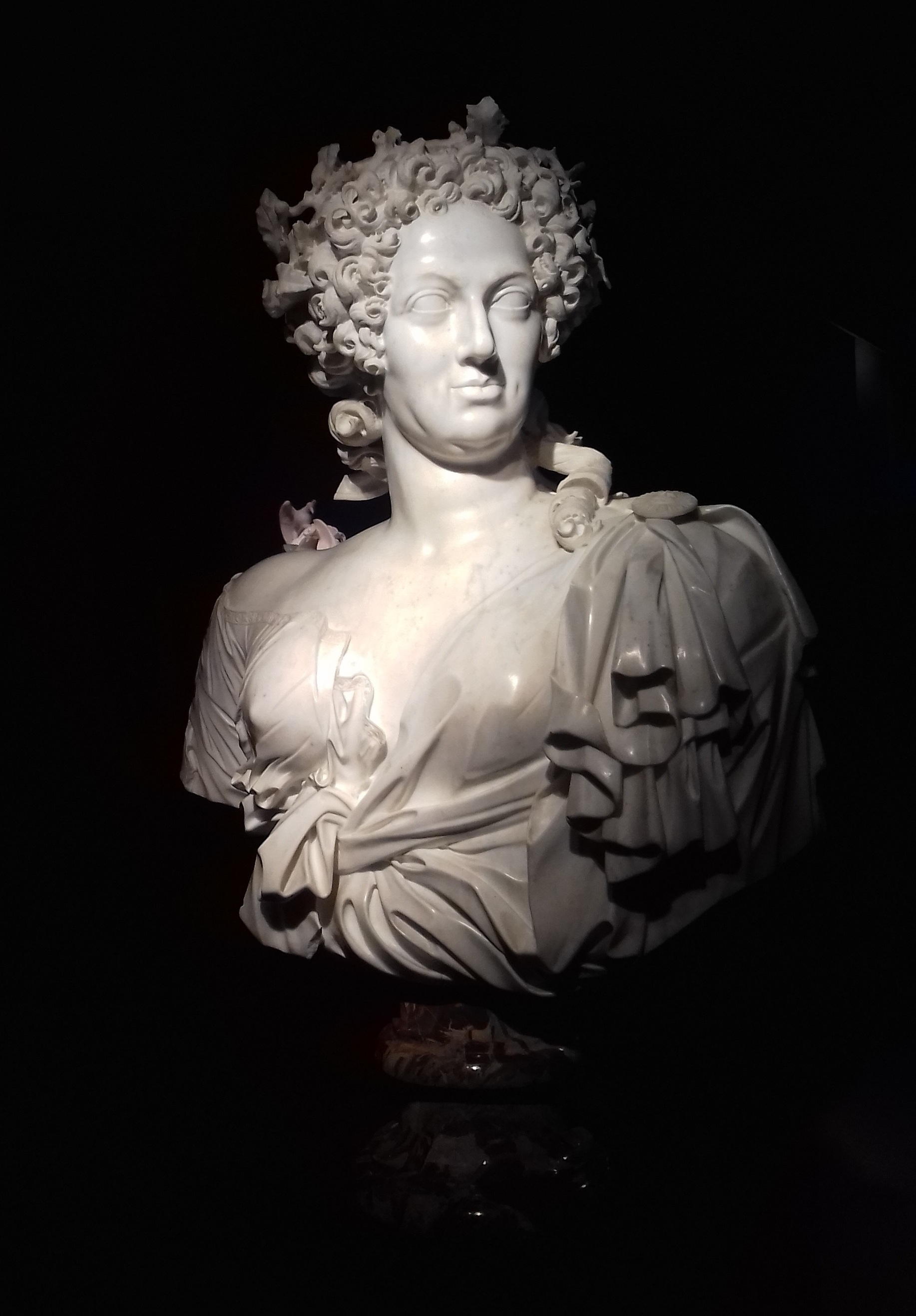 Giulio Cartari, Busto-ritratto di Cristina di Svezia, Palacio Real de La Granja de San Ildefonso